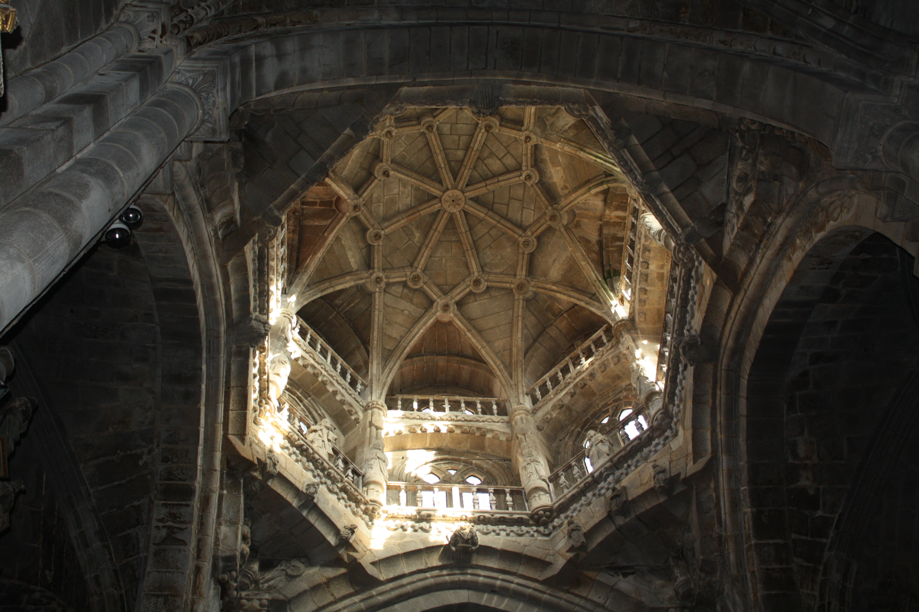 Bóveda do ciborio da Catedral de Ourense.